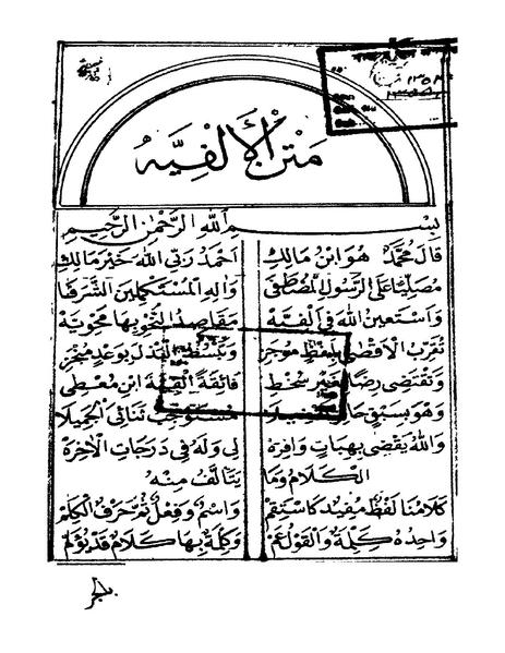 نسخة لألفية ابن مالك من 23 ذي الحجة سنة 1309 هـ